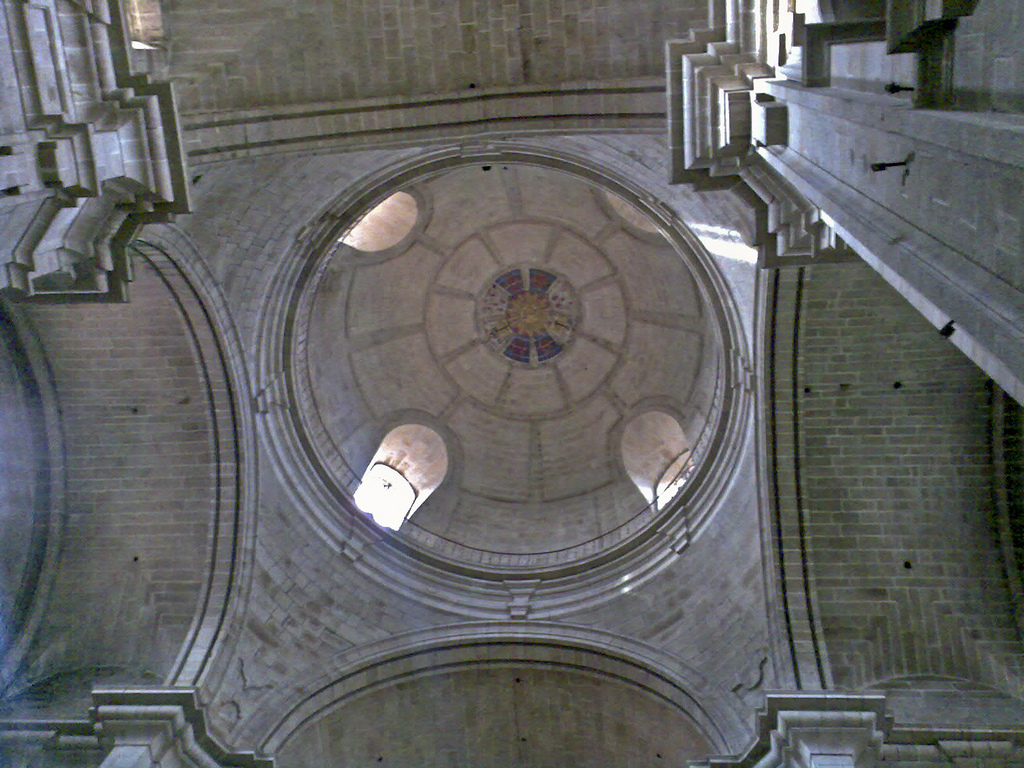 Convento de San Francisco de Val de Deus